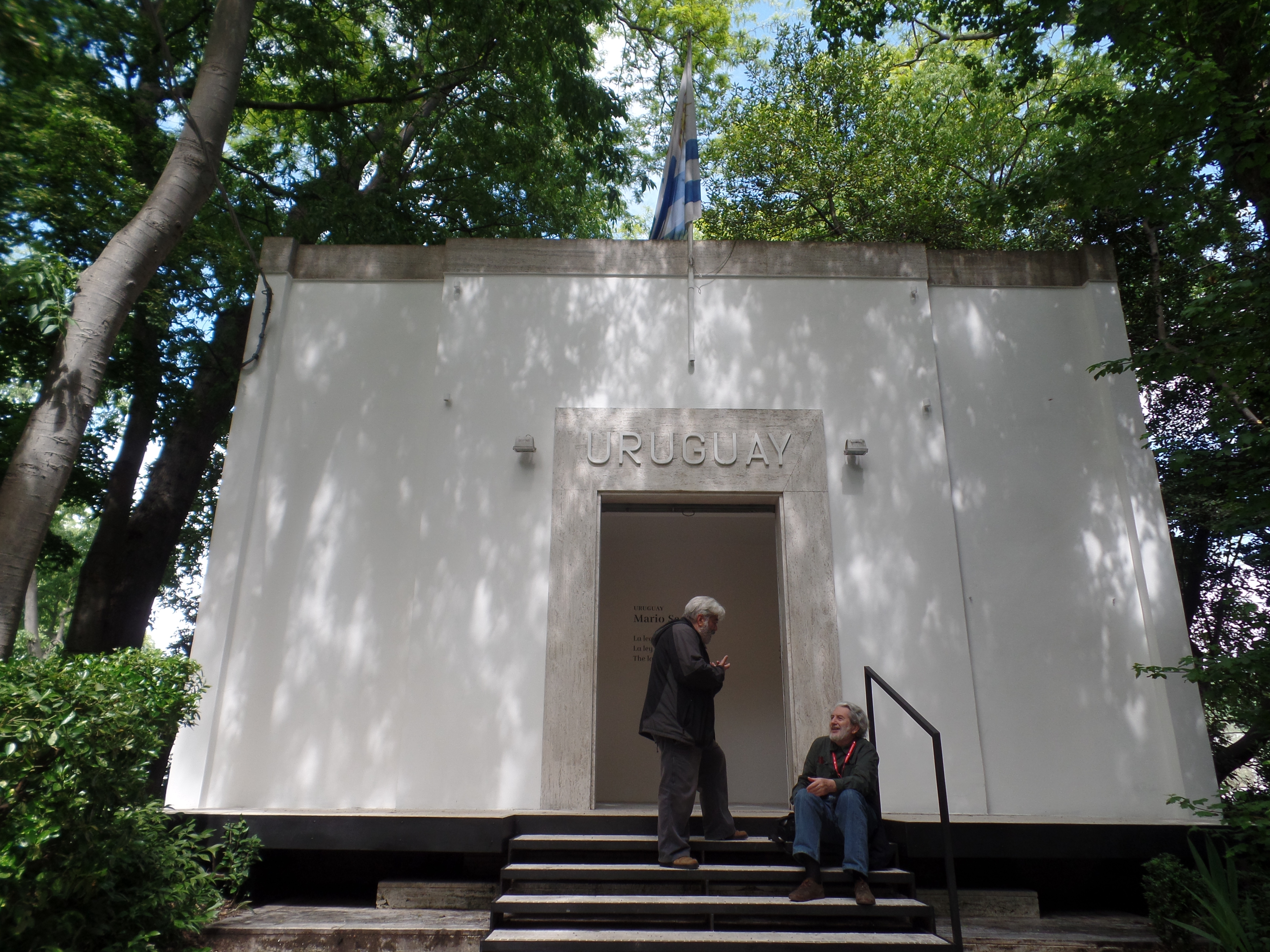 Pórtico del Pabellón Uruguayo en la Bienal de Venecia